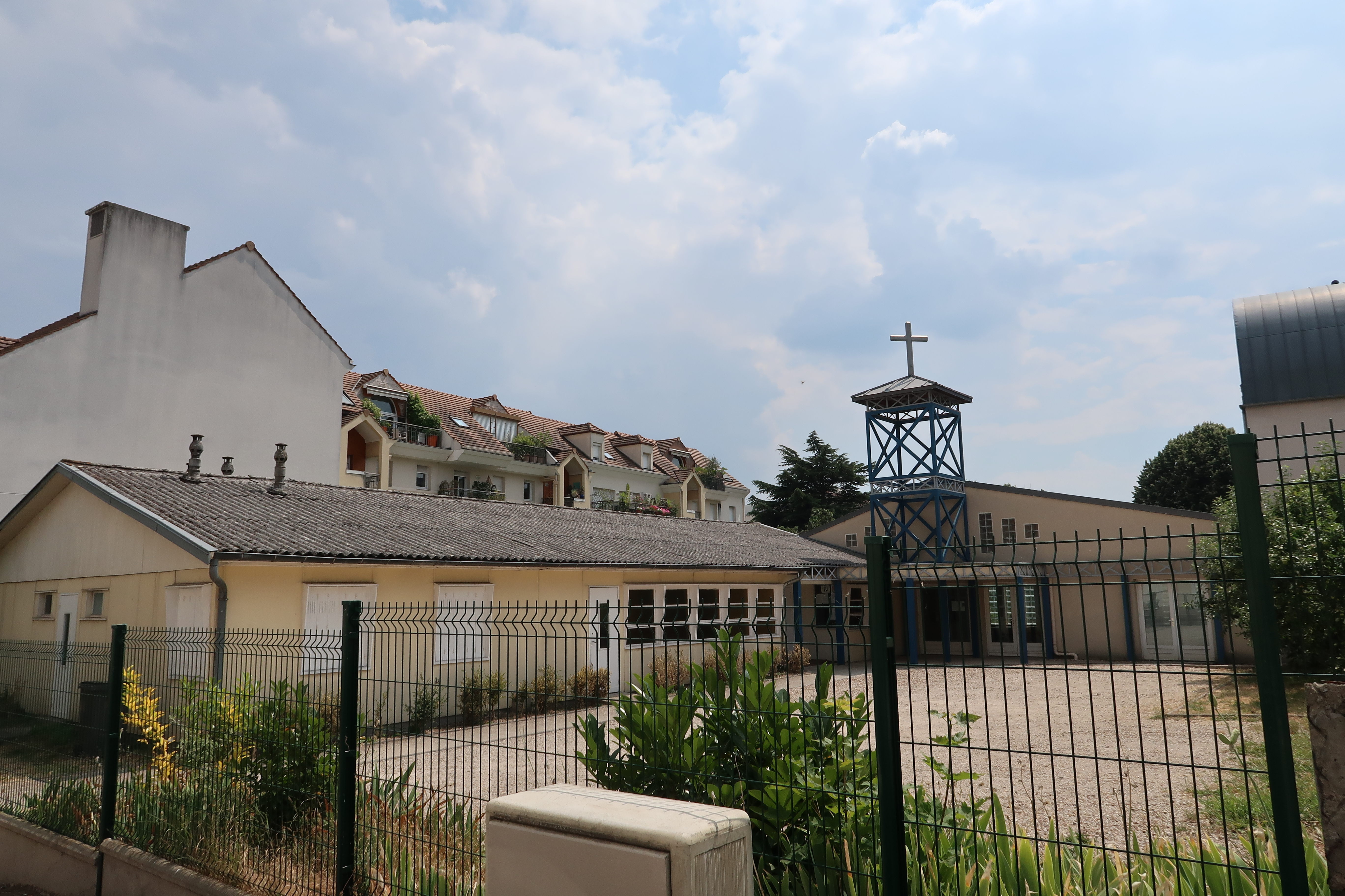 Chapelle Saint-Leufroy à Suresnes (Hauts-de-Seine), 5 rue du Chemin-Vert.